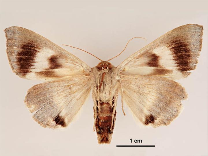 Achaea argilla female, ventral view